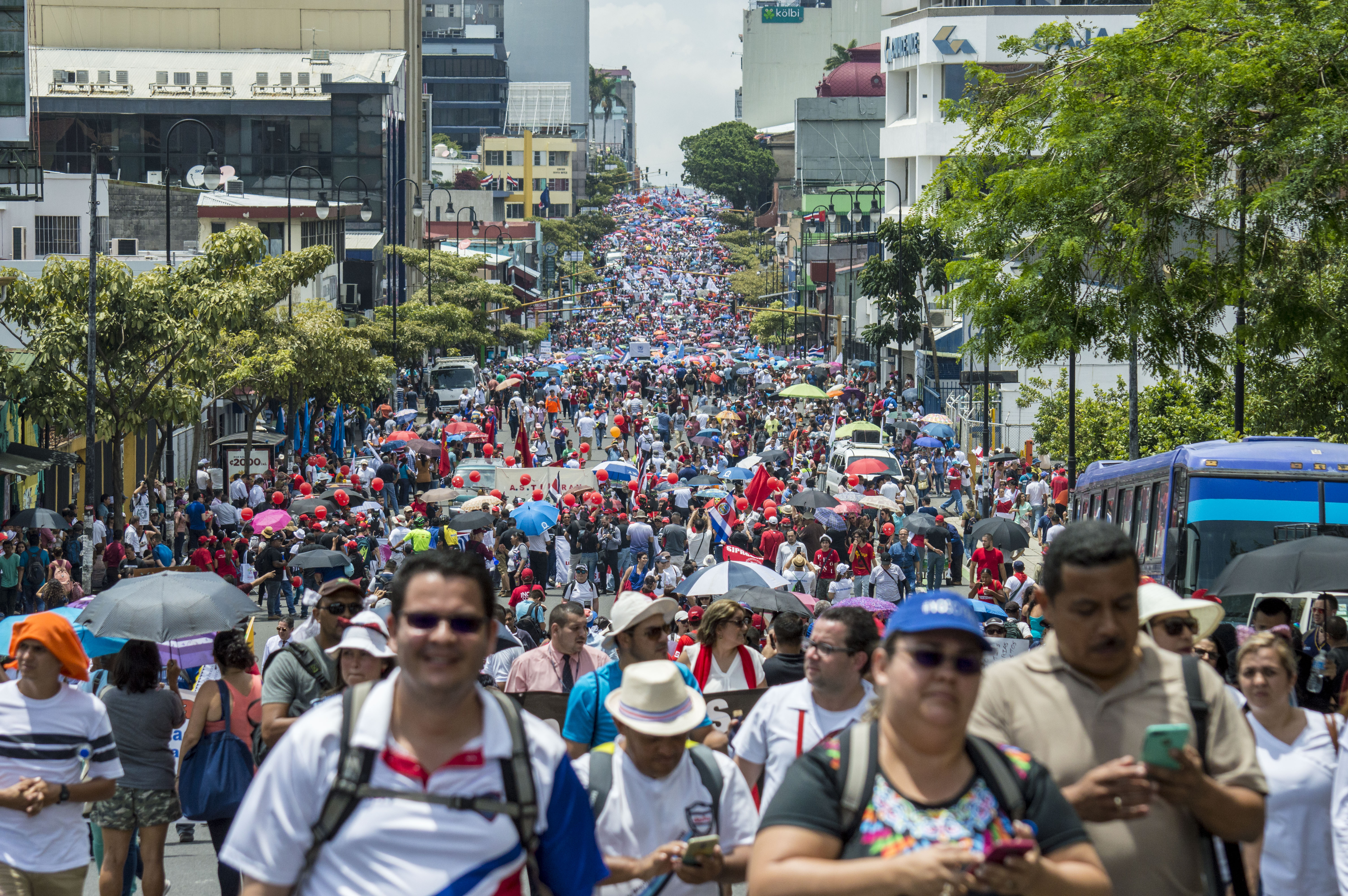 Huelga sindical de Costa Rica de 2018